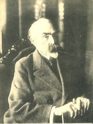 El teórico marxista ruso Georgi Plejánov en abril de 1917 en Petrogrado.